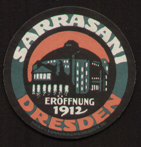 Zirkus Sarrasani in Dresden, Eröffnung 1912. Vignette